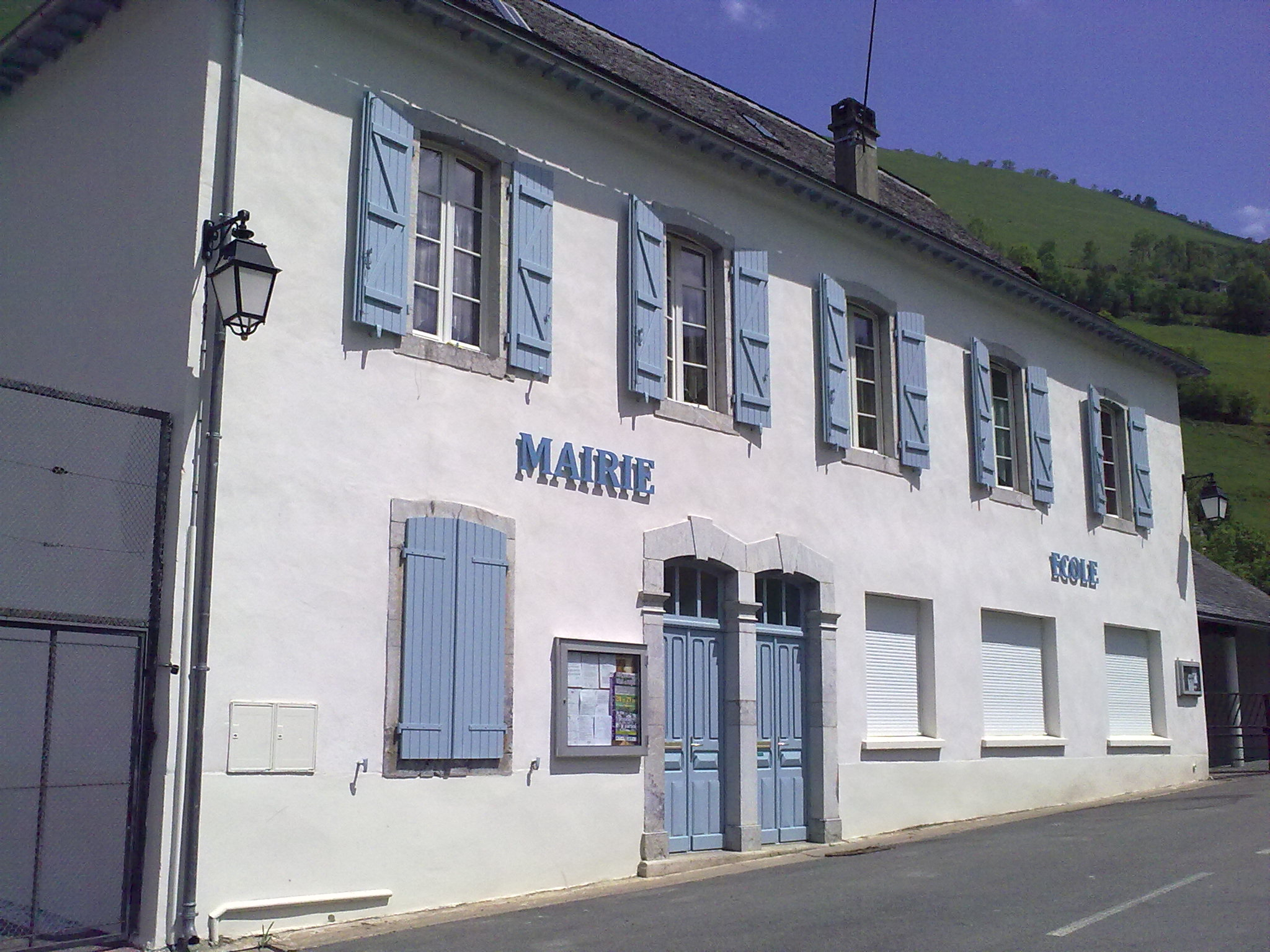 Lourdios-Ichère, France, le 23 mai 2010.